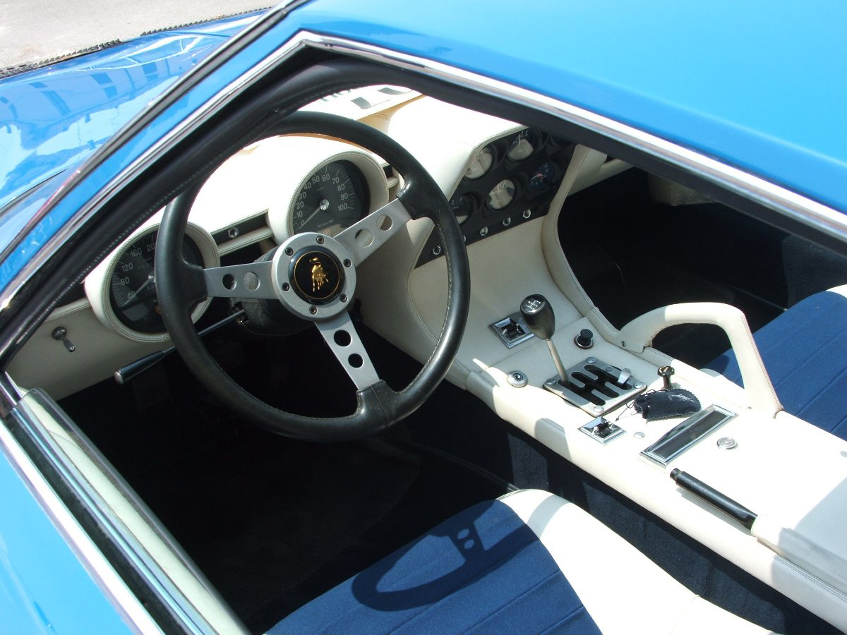 Lamborghini Miura P 400 S del 1968 fotografata al Raduno Auto Storiche di Medole nel 2007